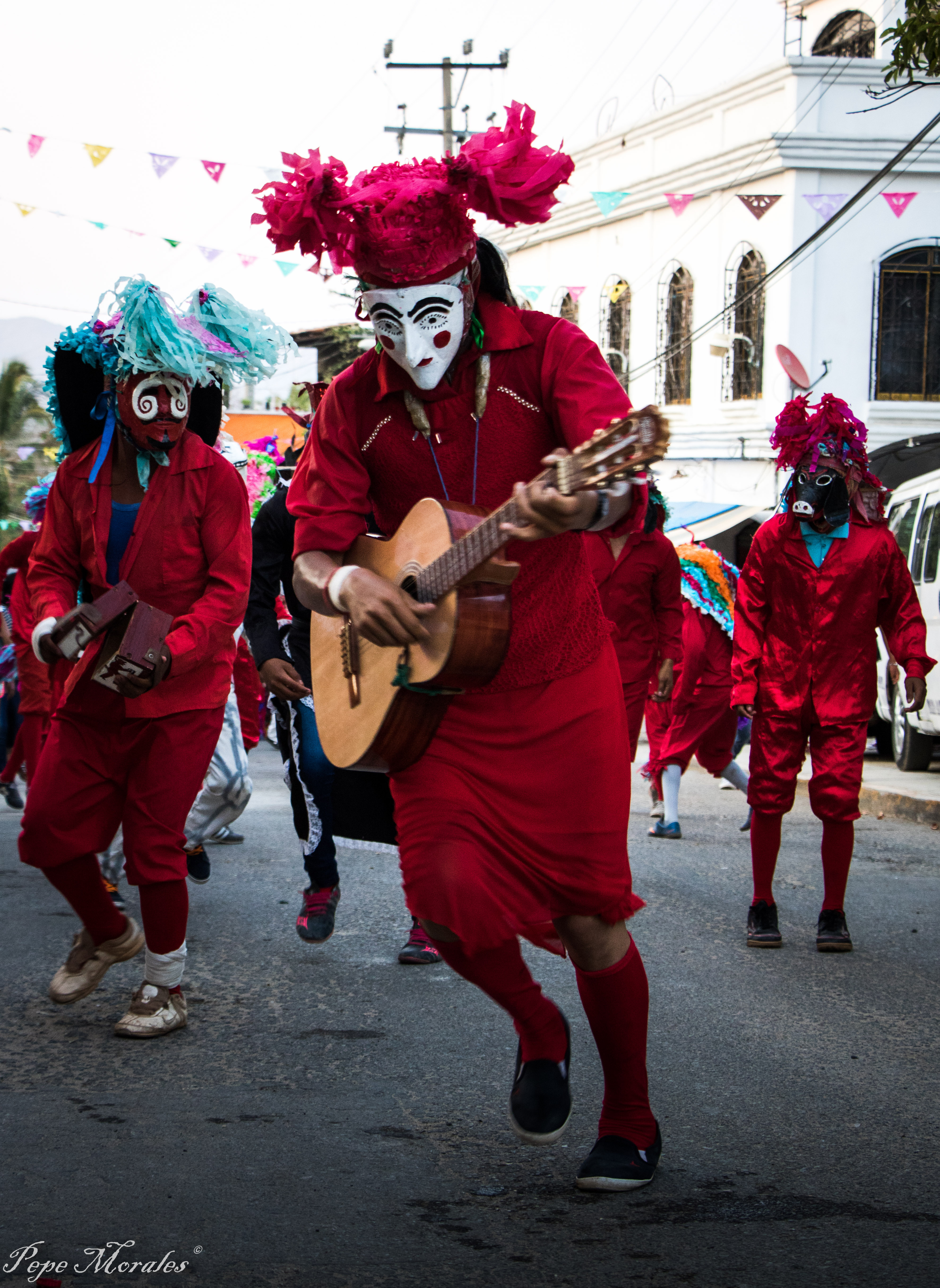 Danza tradicional de la época de la colonia. Las animas, Tecoanapa, Guerrero. Méx.